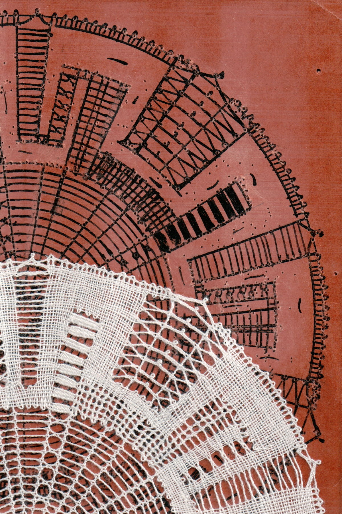 Klöppelspitze, Entwurf der deutschen Spitzenklöpplerin Leni Matthaei, ausgeführt von Christa Zimmermann